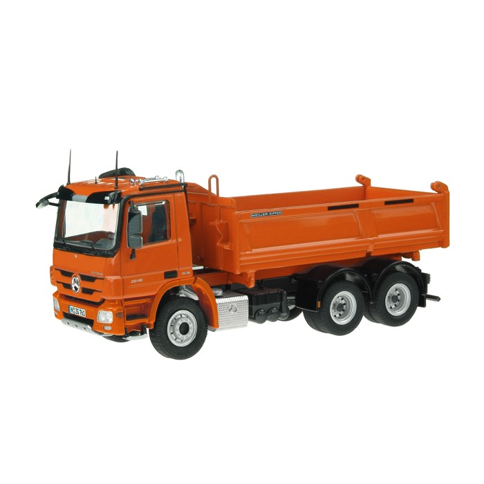 MERCEDES-BENZ Actros 6x4 NZG Modell